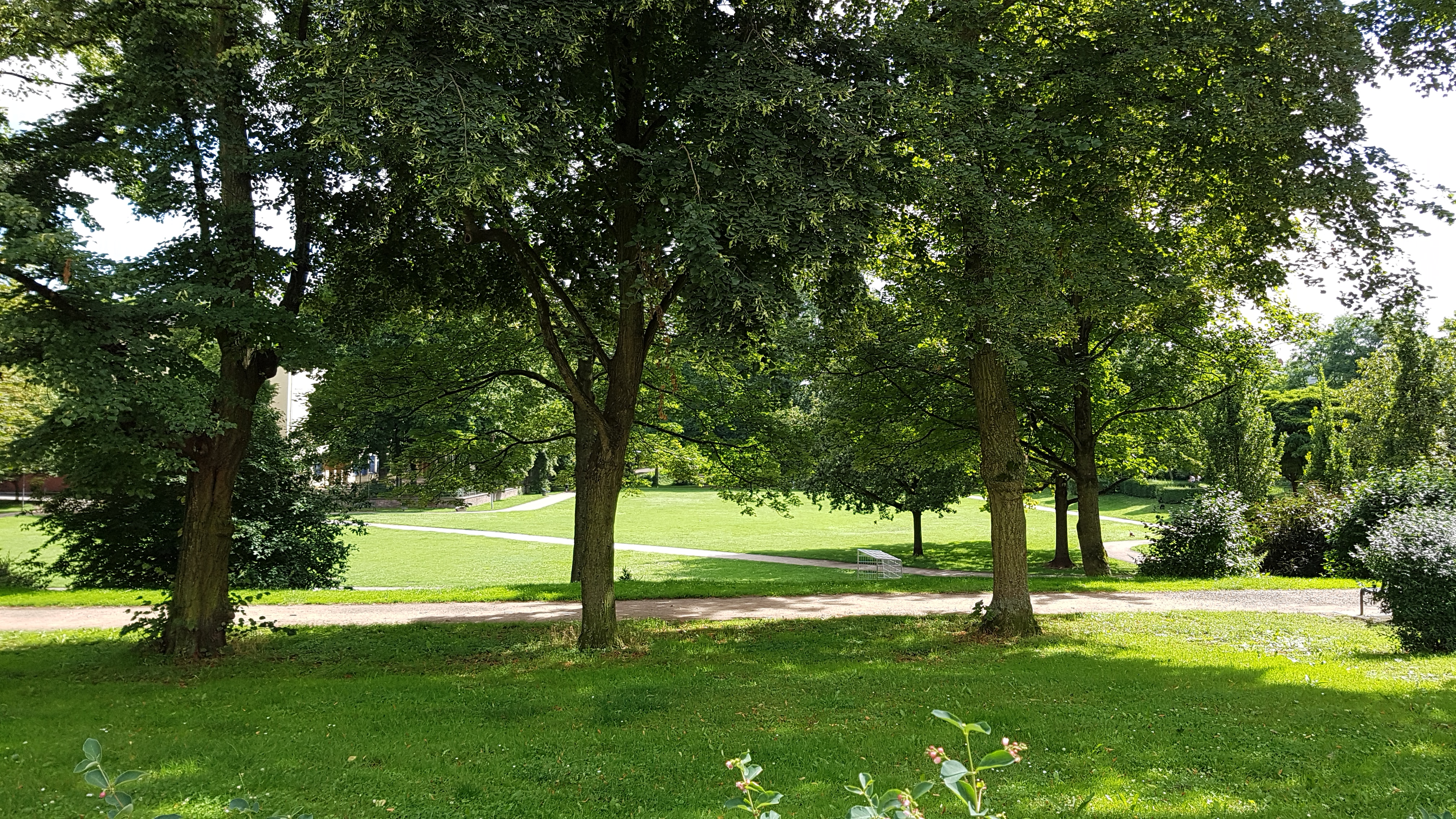 Baudenkmal